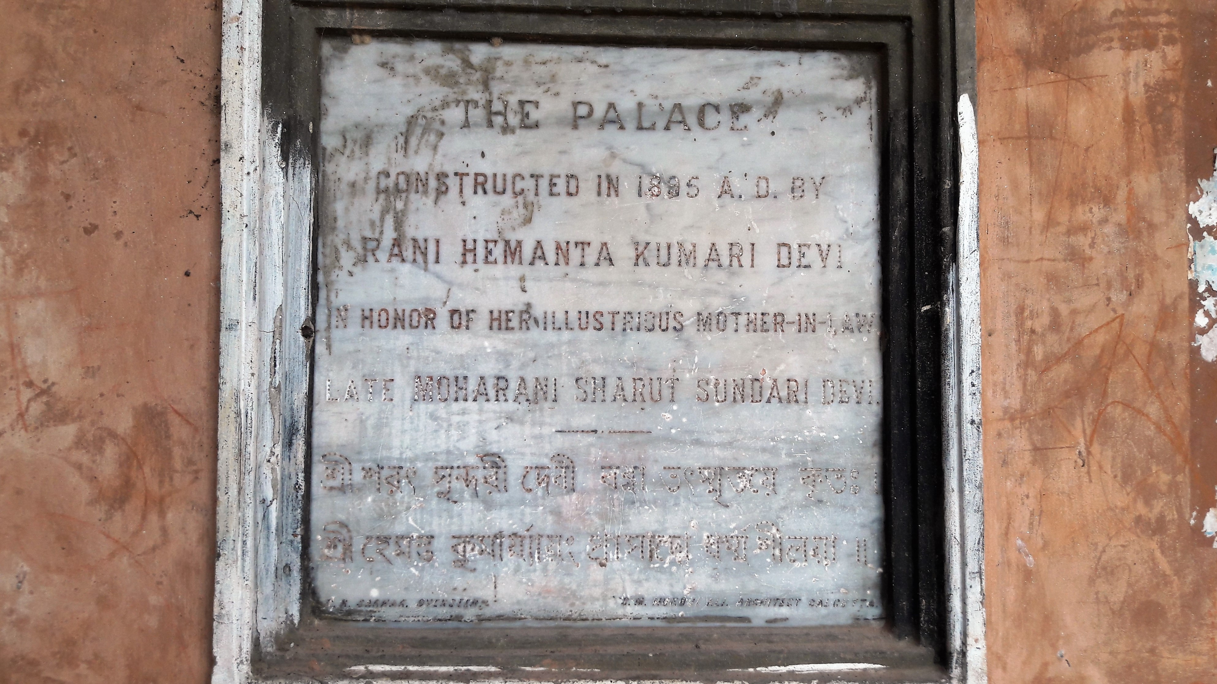 পুঠিয়া রাজবাড়ি পুঠিয়ার জমিদার এর রাজপ্রাসাদ। এটি পুঠিয়া উপজেলা, রাজশাহীতে অবস্থিত।